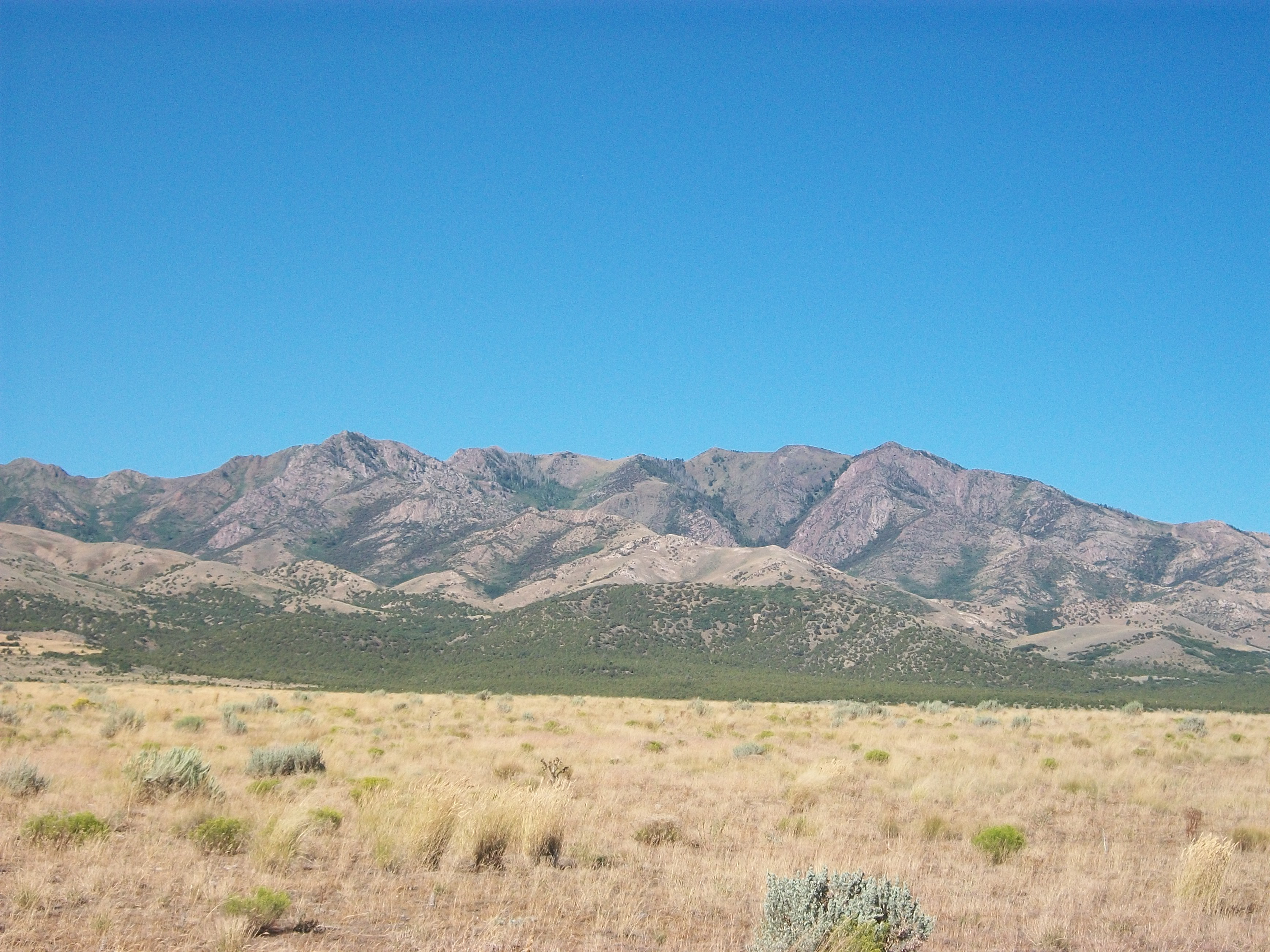 Approaching Harker Canyon, Utah.